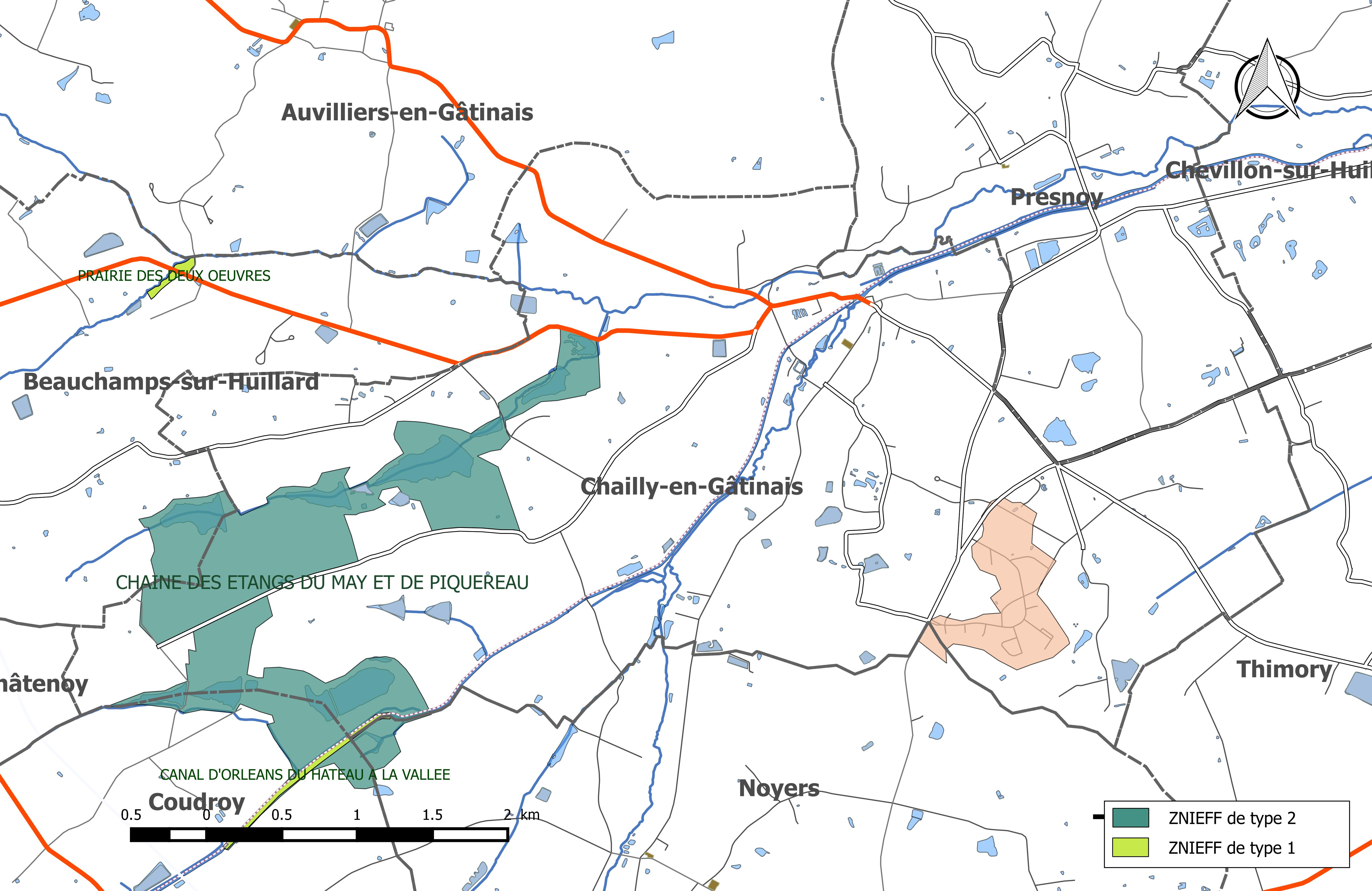 Carte des Zones naturelles d'intérêt écologique faunistique et Floristique (ZNIEFF) de la commune de Chailly-en-Gâtinais.